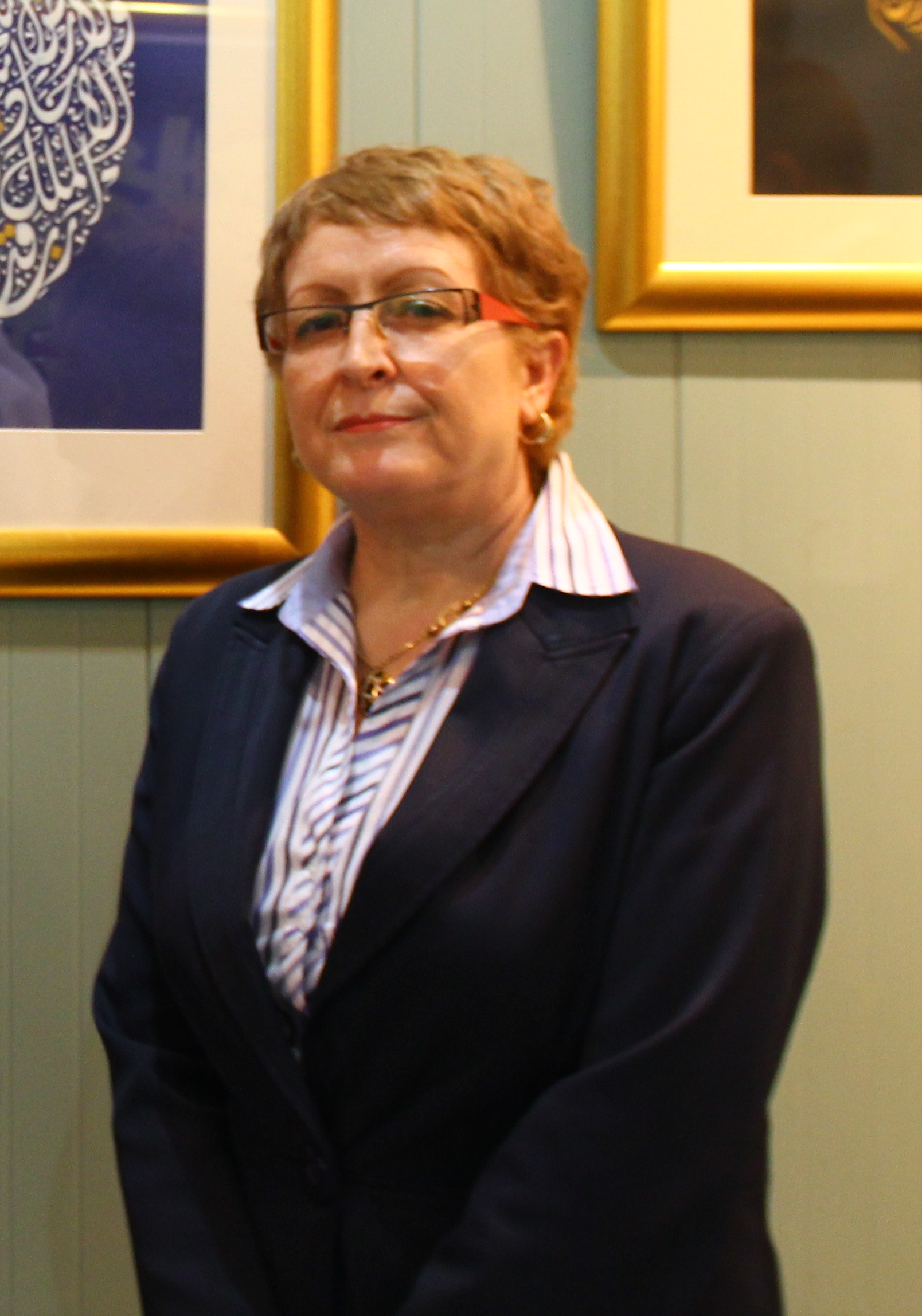 Khalida Toumi